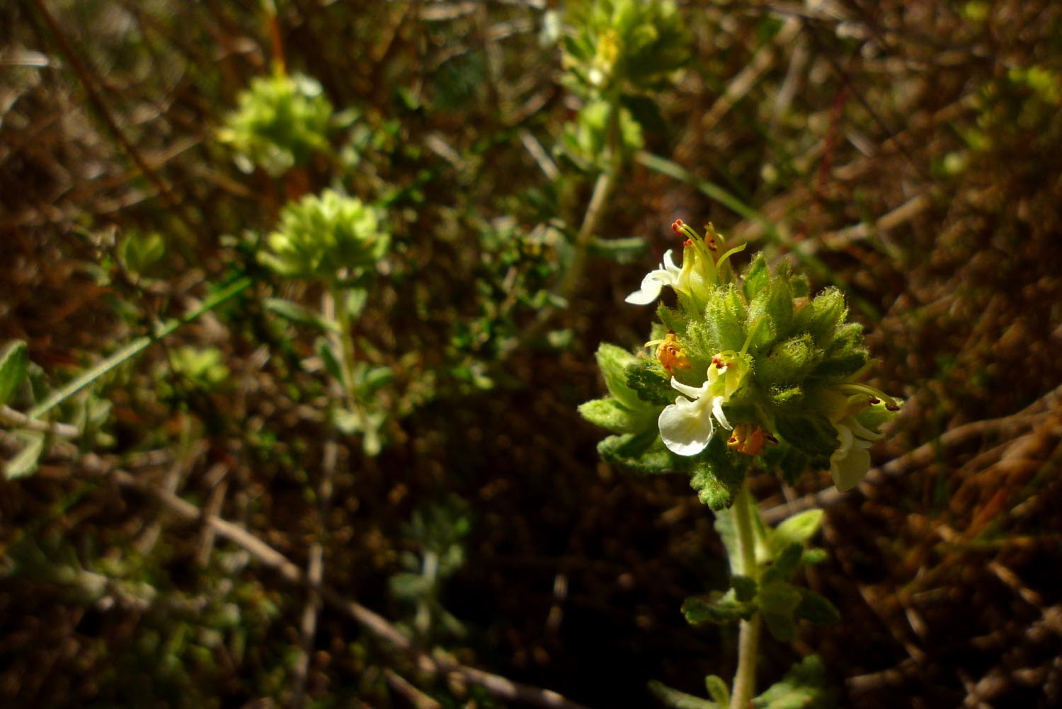 Zamarrilla de Cartagena, endemismo de la Sierra Minera de Cartagena-La Unión (España).